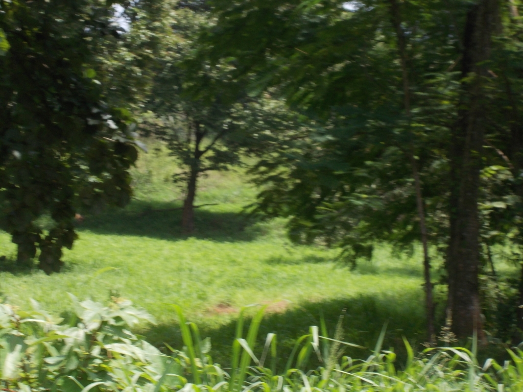 കന്നുകാലി ഗവേഷണകേന്ദ്രം, തിരുവിഴാംകുന്ന്